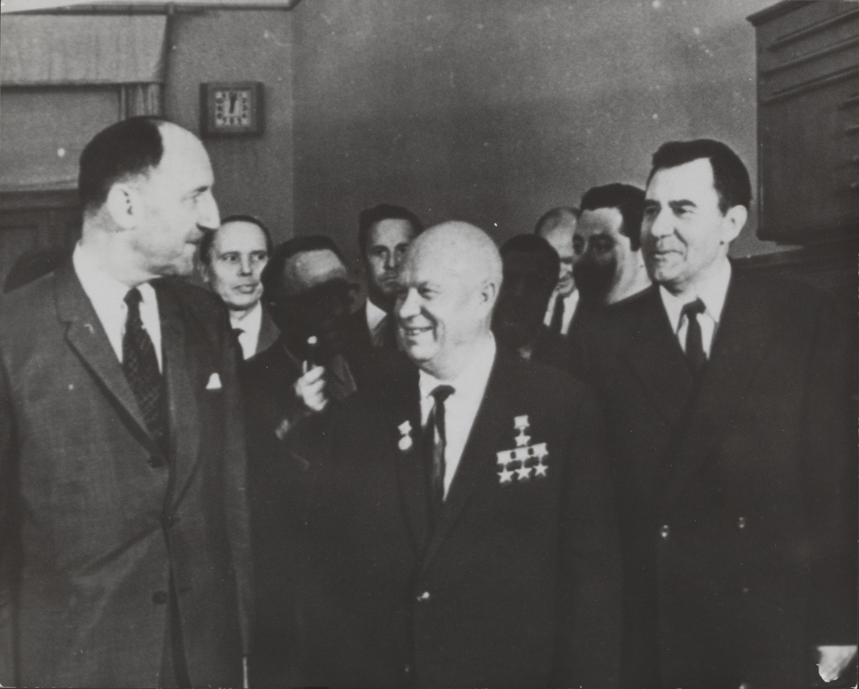 Collectie / Archief : Fotocollectie Elsevier Reportage / Serie : [ onbekend ] Beschrijving : ministers, bezoeken, politici, Croetsjov N., Gromyko A., Luns, J.A.M.H. Datum : 8 juli 1964 Locatie : Moskou, Sovjet-Unie Trefwoorden : bezoeken, ministers, politici Persoonsnaam : Croetsjov N., Gromyko A., Luns, J.A.M.H., Luns, Joseph Fotograaf : Fotograaf Onbekend / Anefo Auteursrechthebbende : Nationaal Archief Materiaalsoort : Foto (zwart/wit) Nummer archiefinventaris : bekijk toegang 2.24.05.02 Bestanddeelnummer : 083-0921